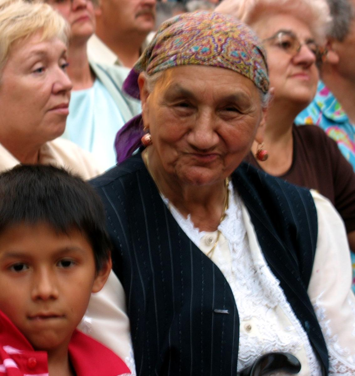 Zdjęcie wykonane w gorzowskim amfiteatrze podczas koncertu festiwalowego Romane Dywesa